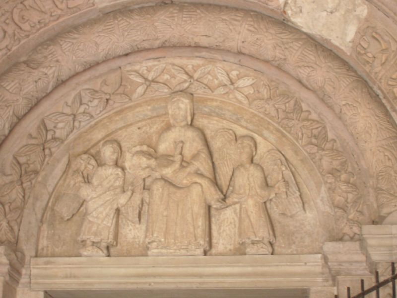 Kolegiata w Tumie - portal.